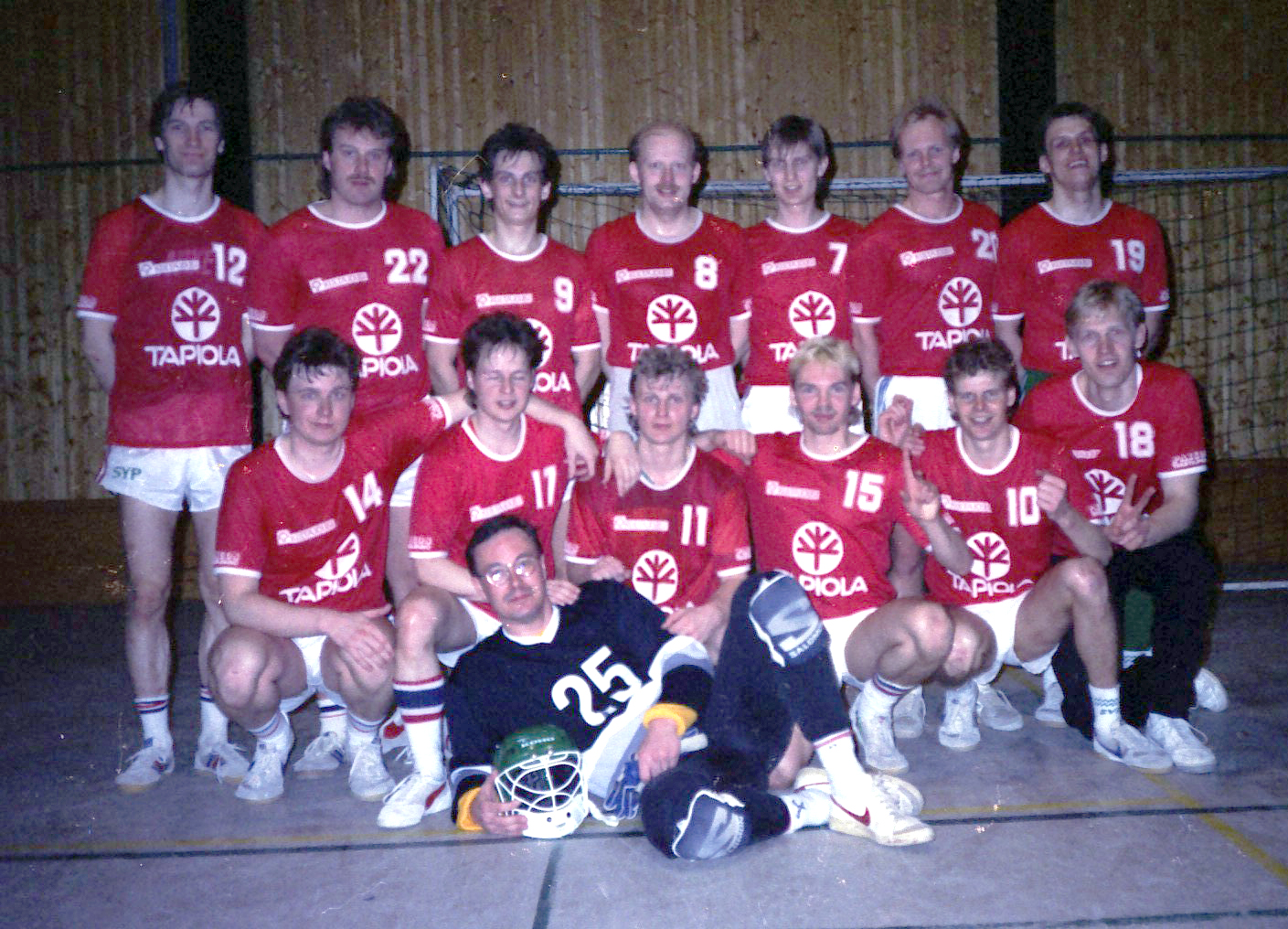 Manse United Ahvenanmaalla kauden viimeisen turnauksen jälkeen. Takarivistä (vas) Vesa Rinne (C), Ari Kuusisto, Kai Telanne, Pekka Loikkanen, Sakari Uutela, Tapio Kivikangas ja Kalle Veirto. Edessä Esa Jääskeläinen, Timo Jantunen, Jari Pajunen, Panu Pitkänen, Jari Löppönen ja Janne Sjöman. Pelaajien edessä maalivahti Atte Rantanen.